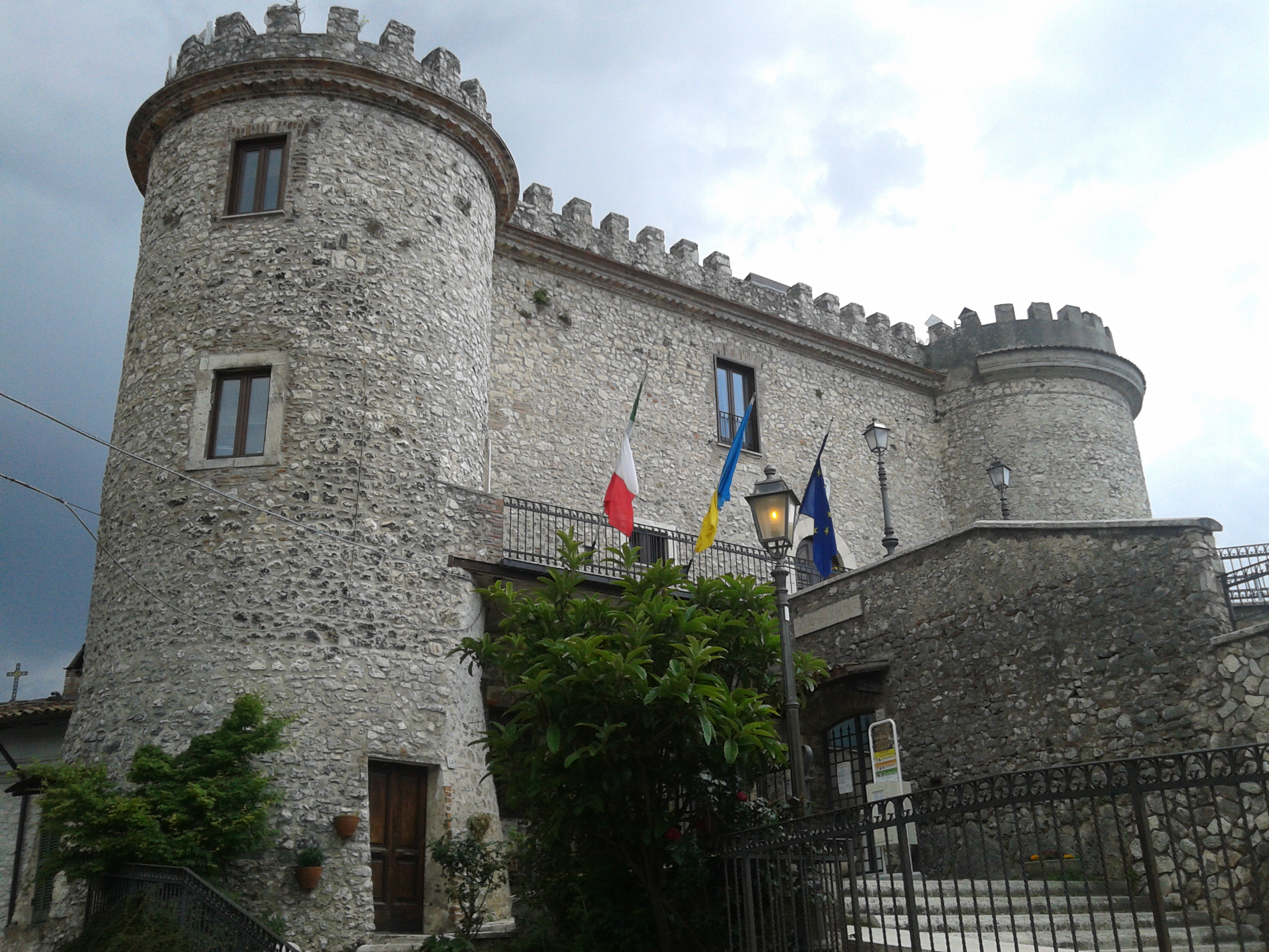 Castello medievale di Oricola